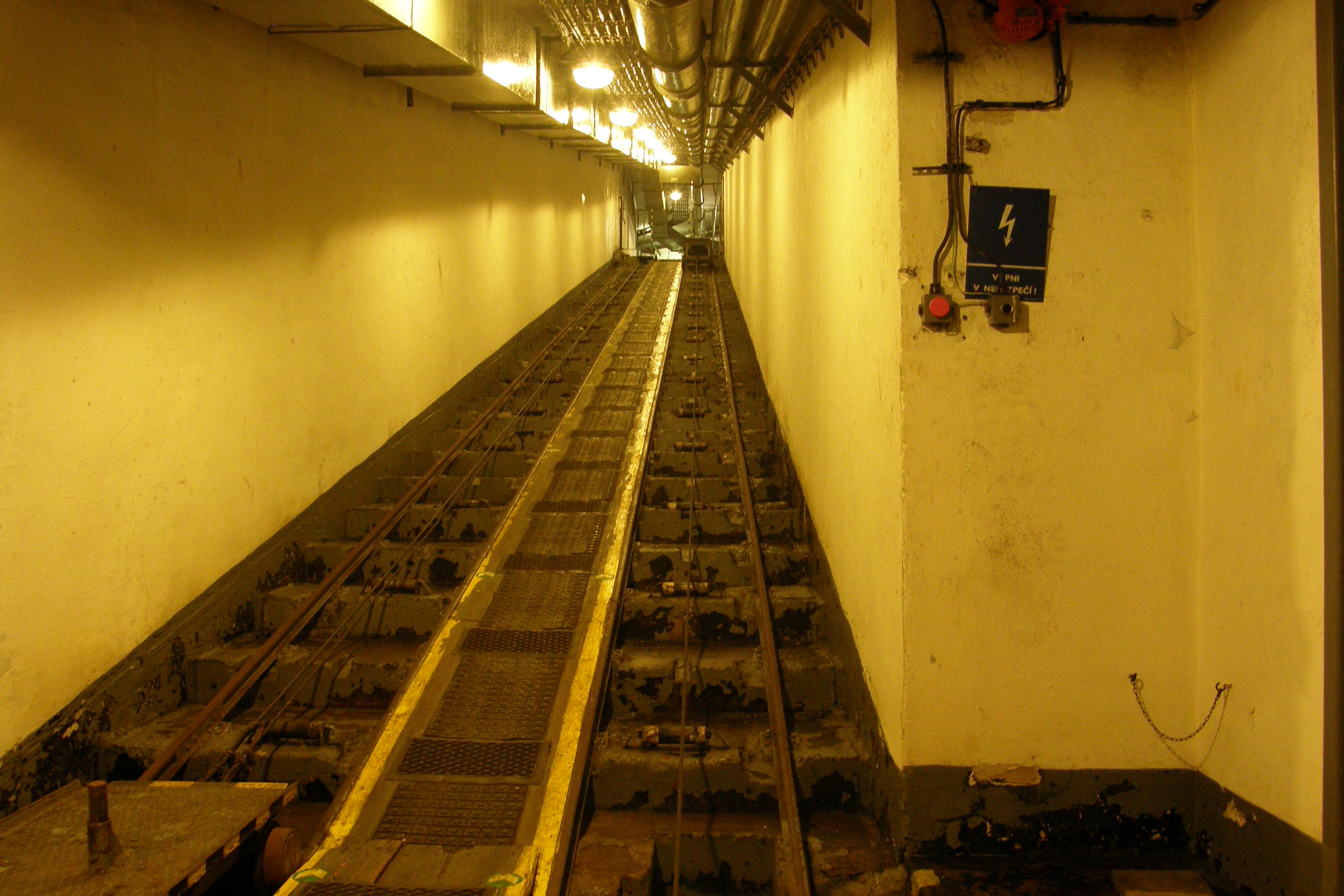 Svážnice spojující srub K-S 12a U rybníčku tvrze Hůrka s podzemím